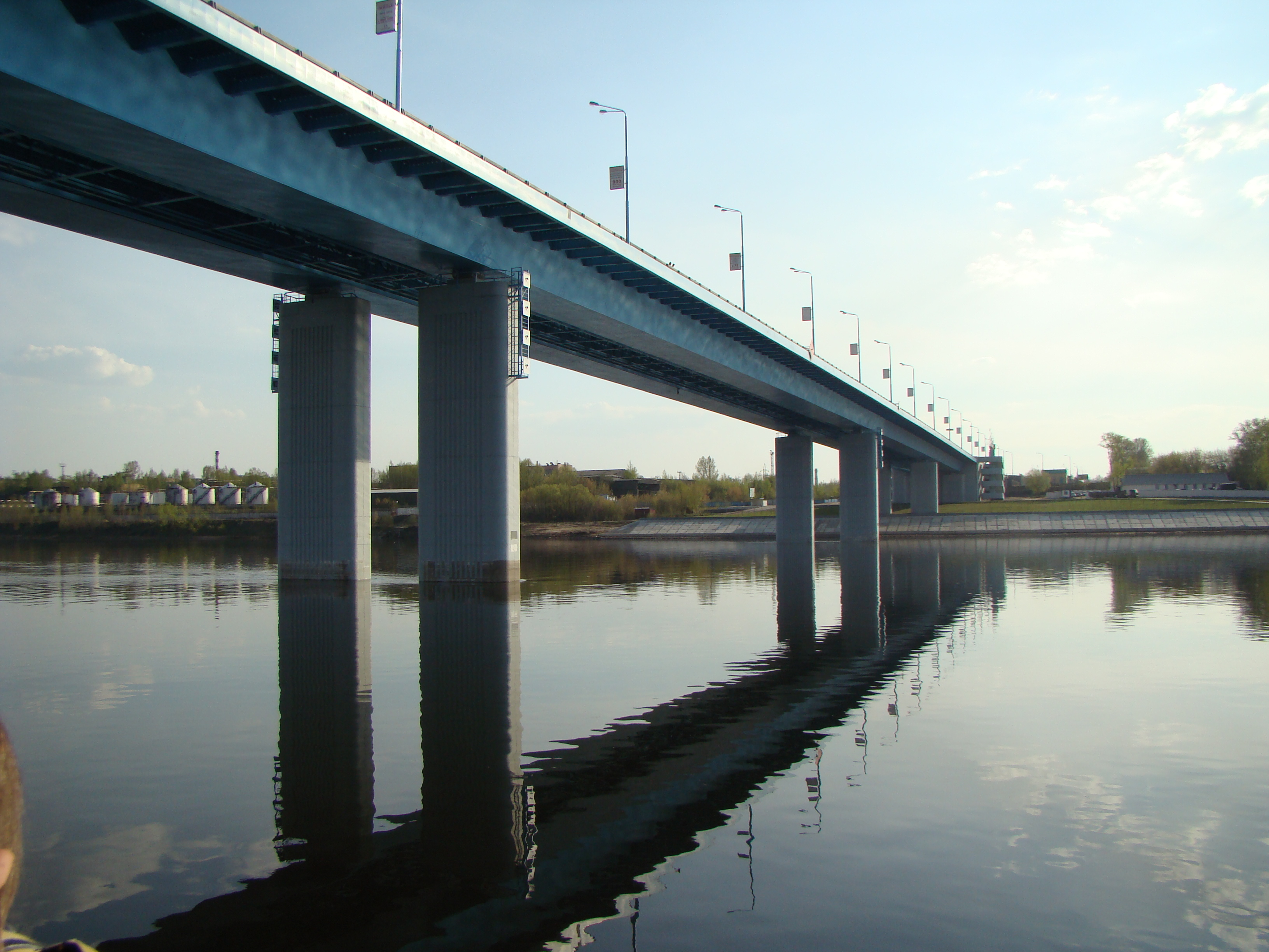 Юбилейный мост